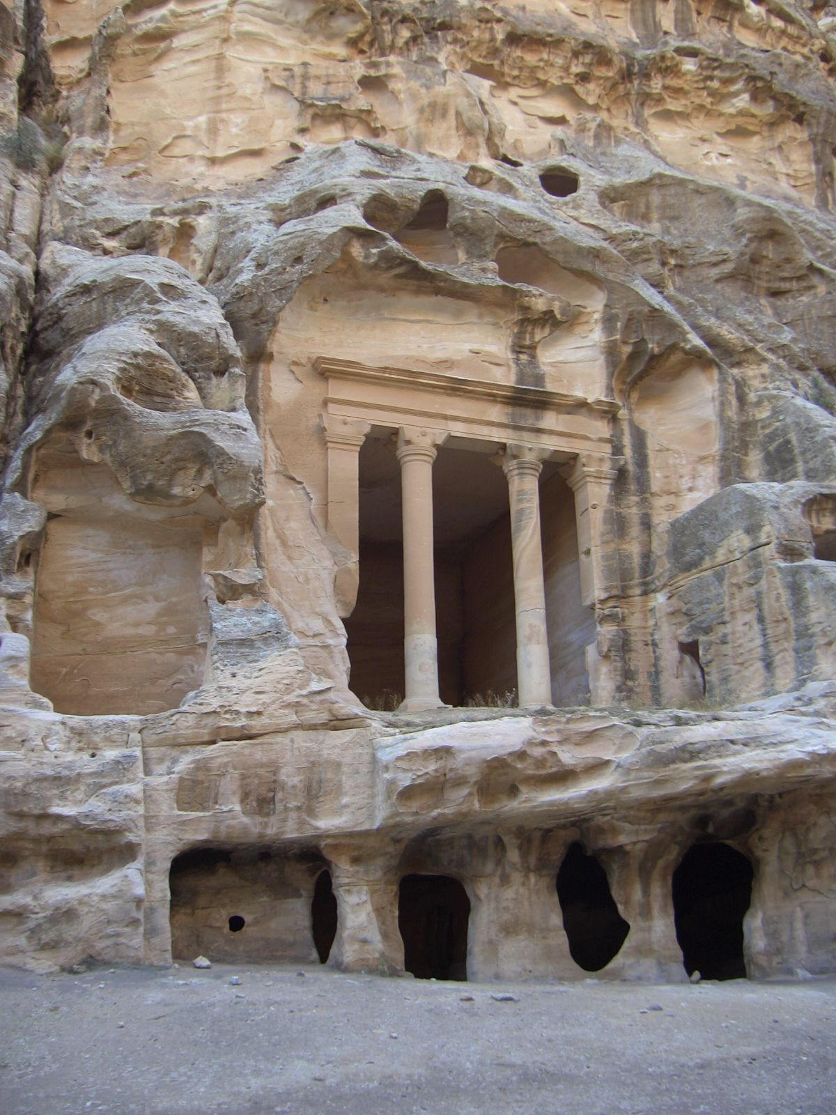 Tempel im Siq el-Barid, Petra, Jordanien